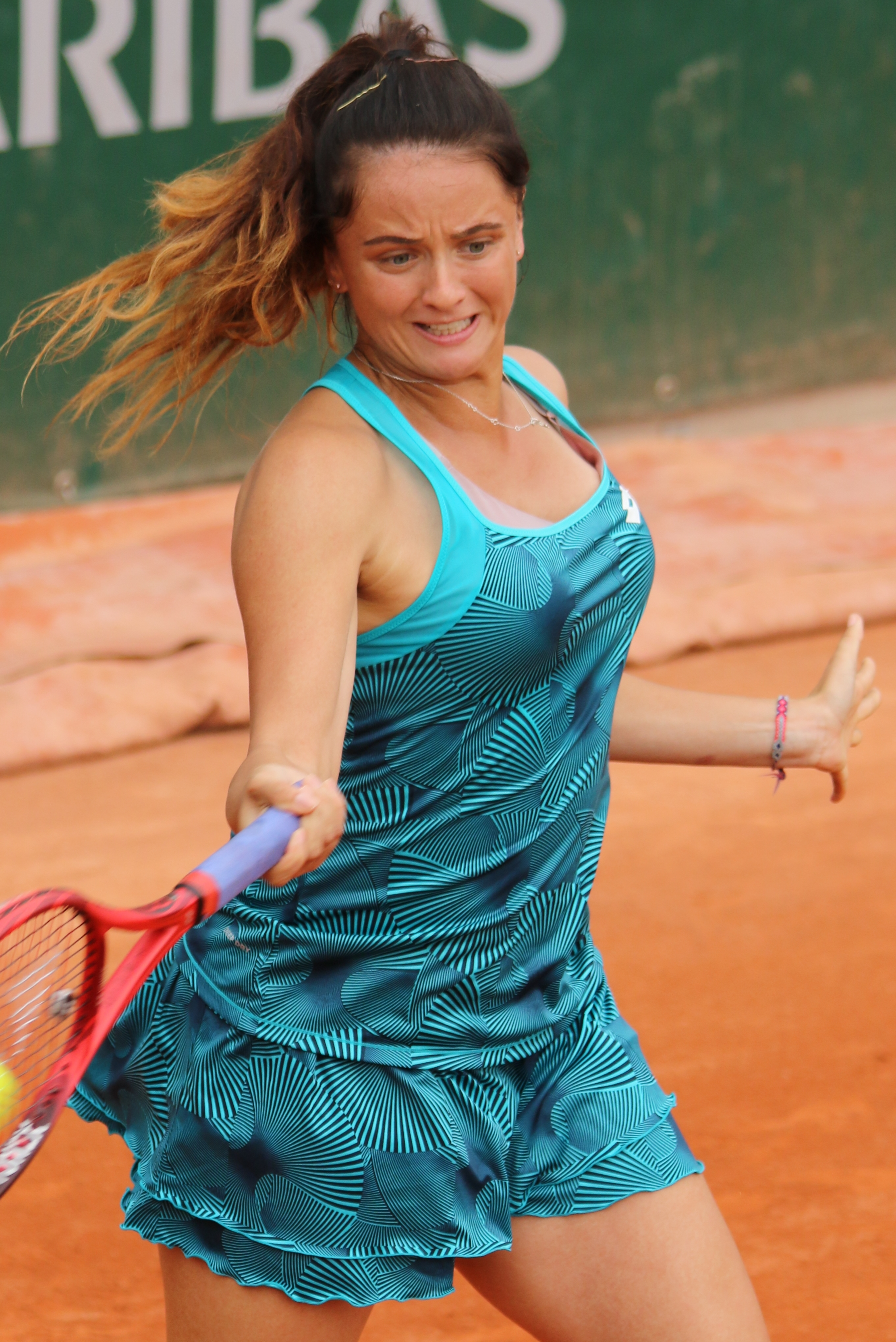 Kuzmova RG19 (20)